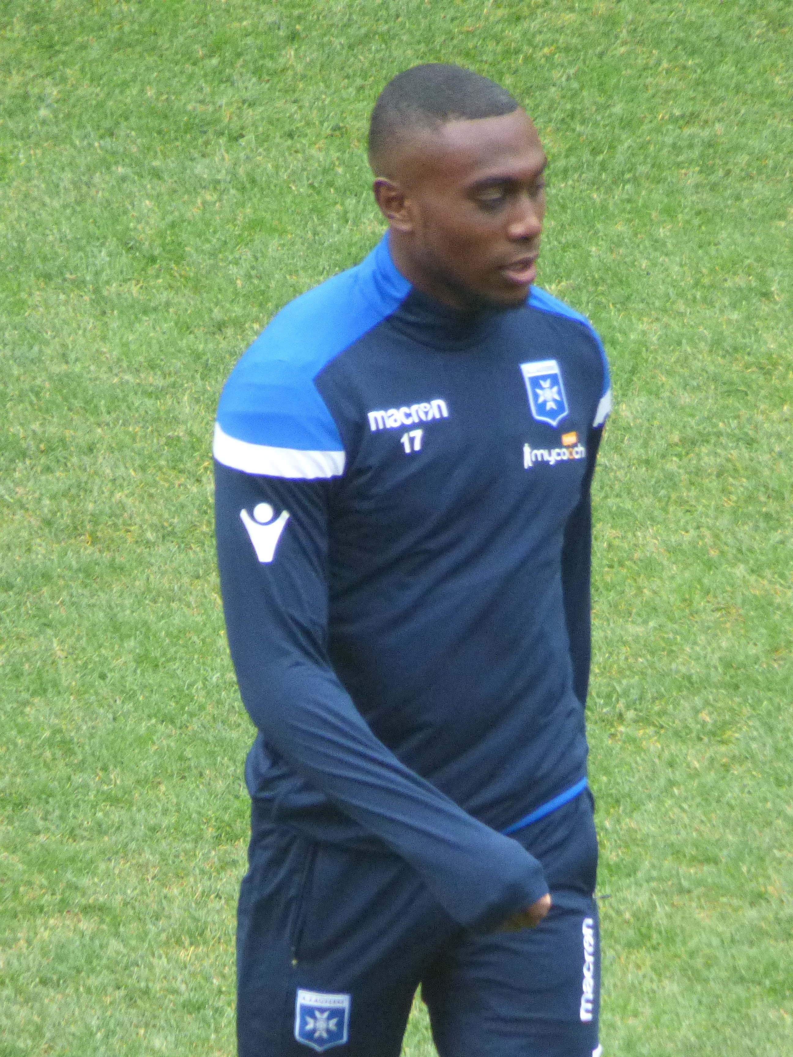 Bendjaloud Youssouf avant le match RC Lens - AJ Auxerre, comptant pour la 28ème journée du championnat de France de football de Ligue 2 2018-2019, le 9 mars 2019 au Stade Bollaert-Delelis.